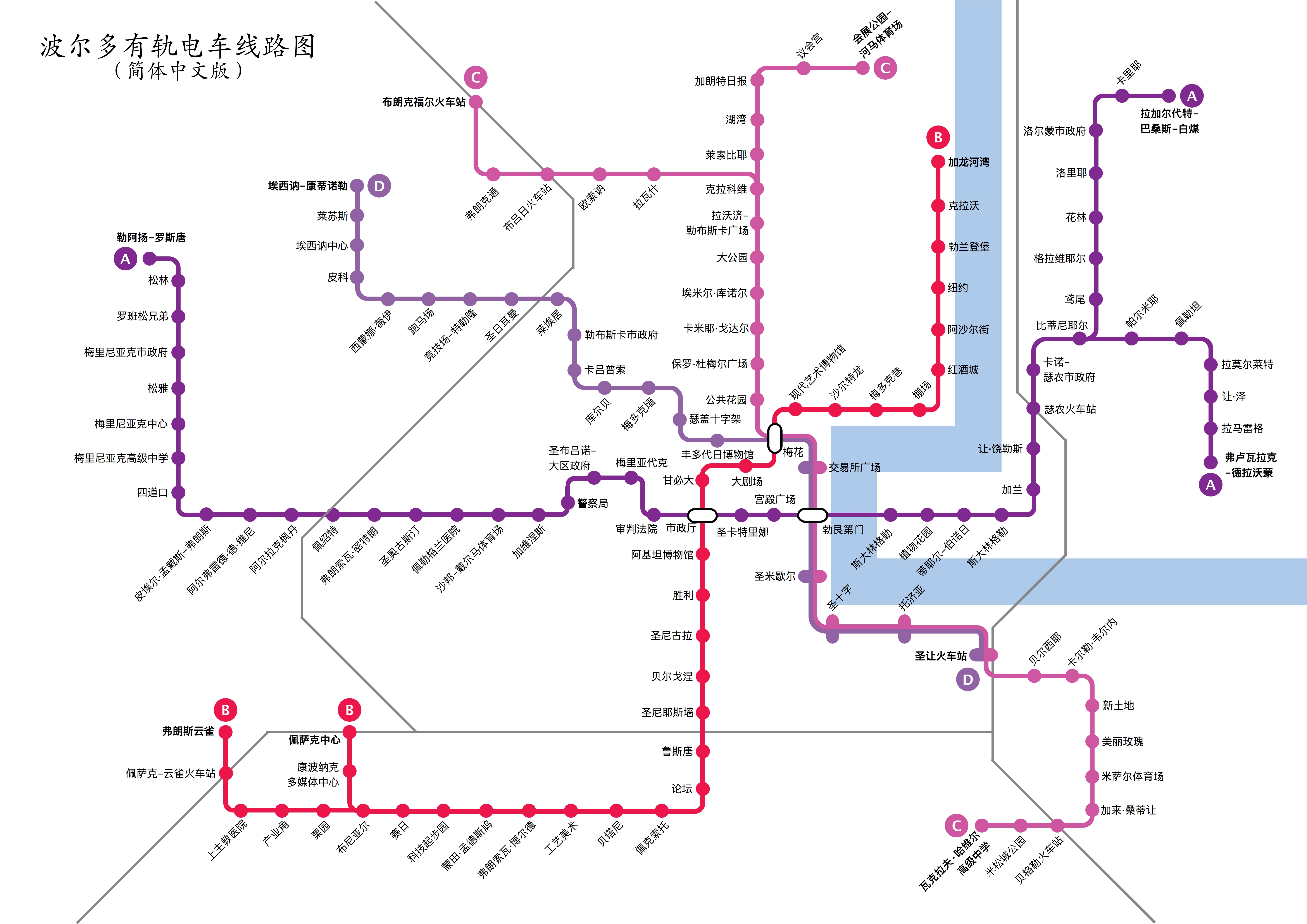 plan du réseau de tramway de Bordeaux en chinois